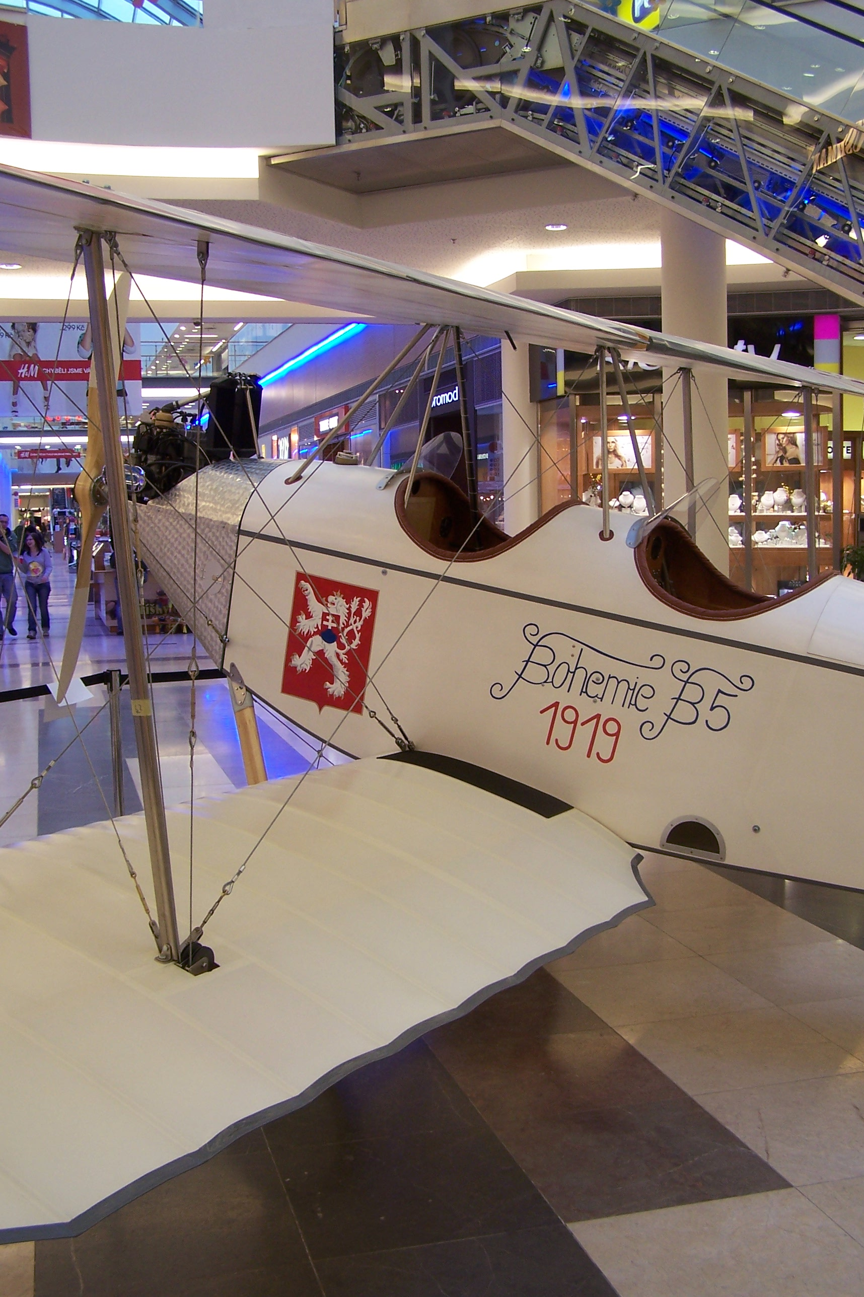 Bohemia B-5